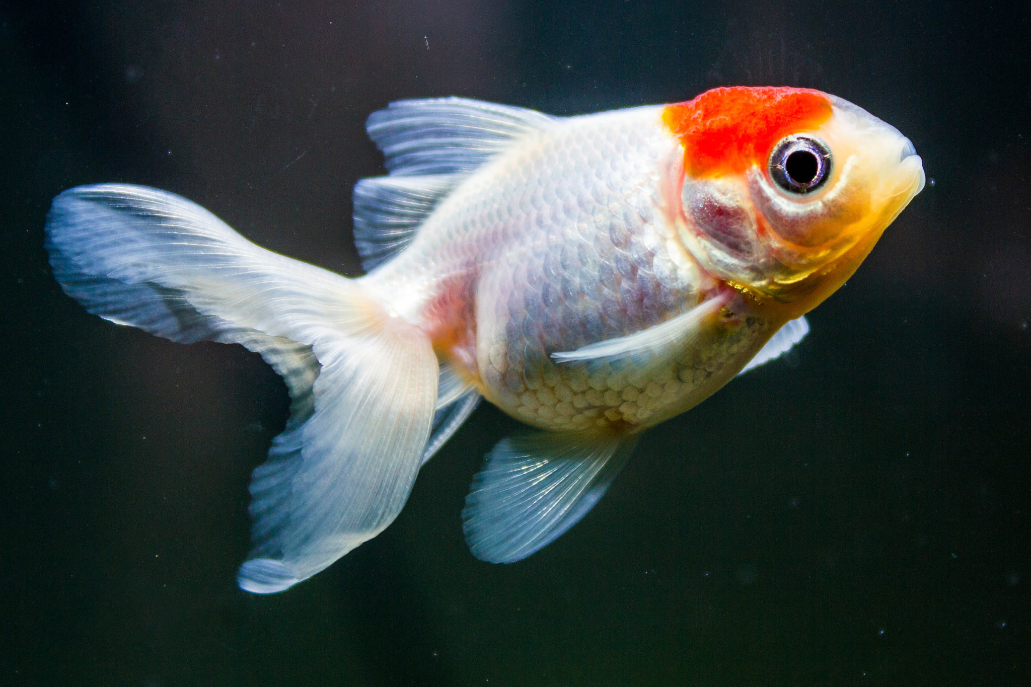 500px provided description: Redcap